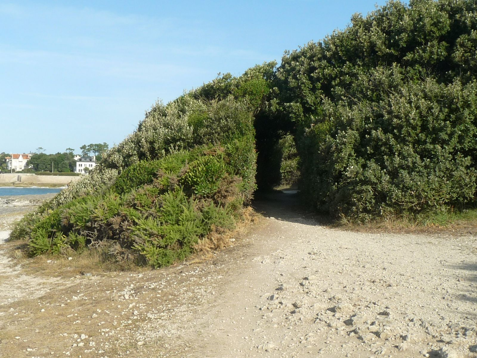 Promenade du Domaine des Fées, Vaux-sur-Mer (17), France. Chênes verts et filaria sculptés par le vent.